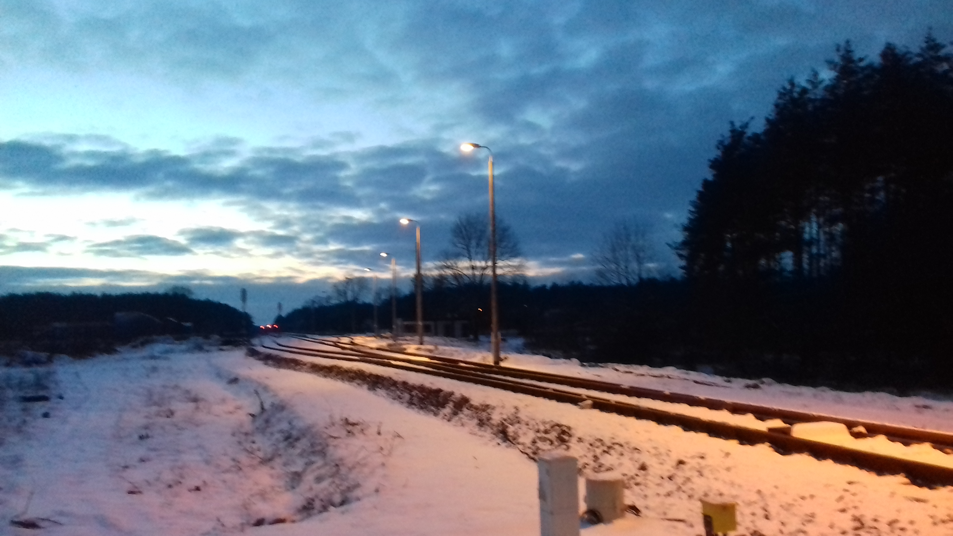 Stacja Czarnowo-Undy widziana z przejazdu kolejowo-drogowego.